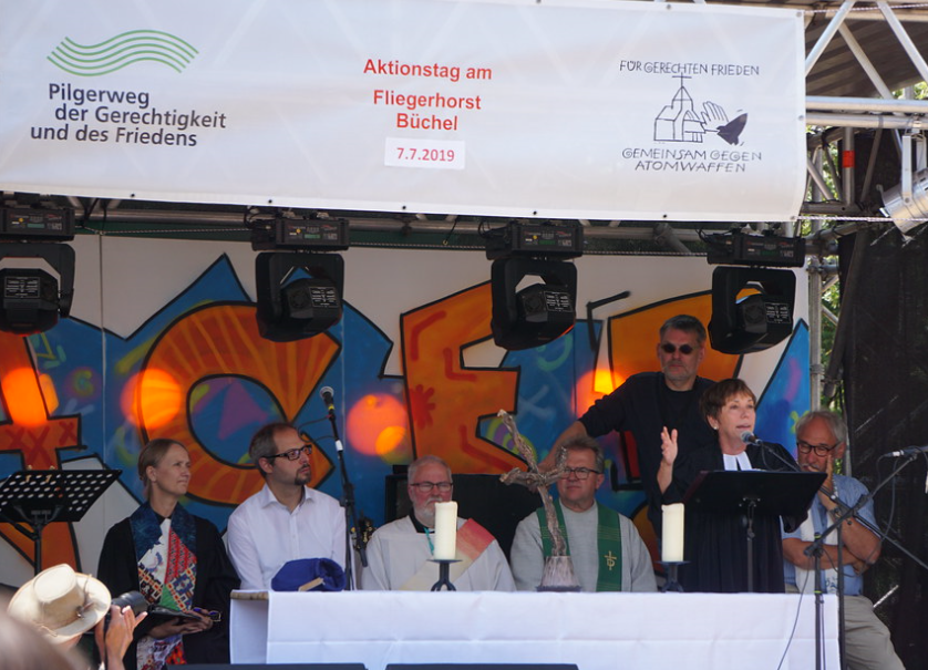 Rund 1000 Christinnen und Christen haben am Bundeswehr-Fliegerhorst Büchel in der Eifel einen Gottesdienst mit einer Predigt der evangelischen Theologin und früheren EKD-Ratsvorsitzenden Dr. Margot Käßmann durchgeführt. Der Aktionstag fand im Rahmen der 20-wöchigen Aktionspräsenz am 07.07.2019 der Kampagne „Büchel ist überall! atomwaffenfrei.jetzt“ statt.